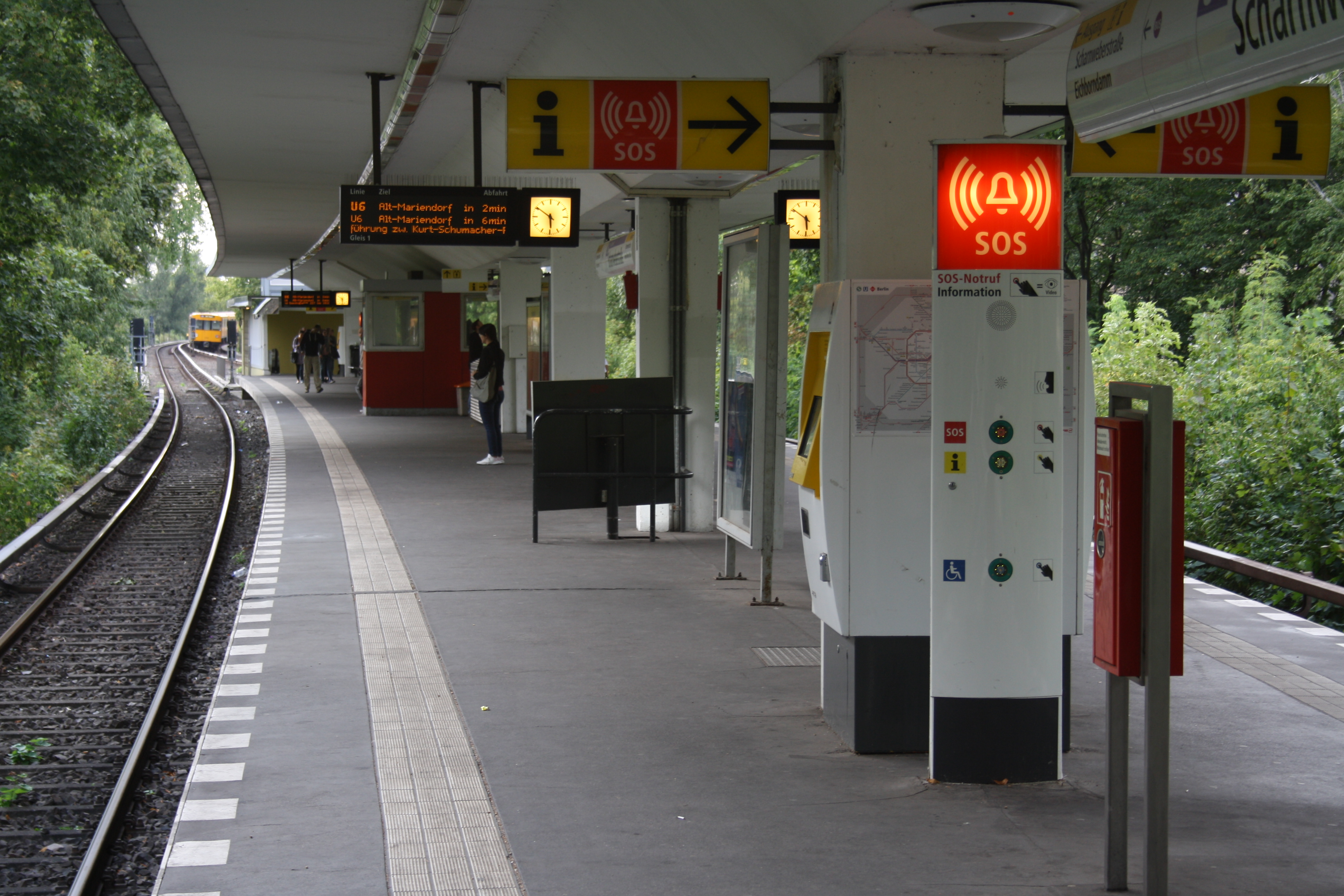 U-Bhf. Scharnweberstraße Berlin